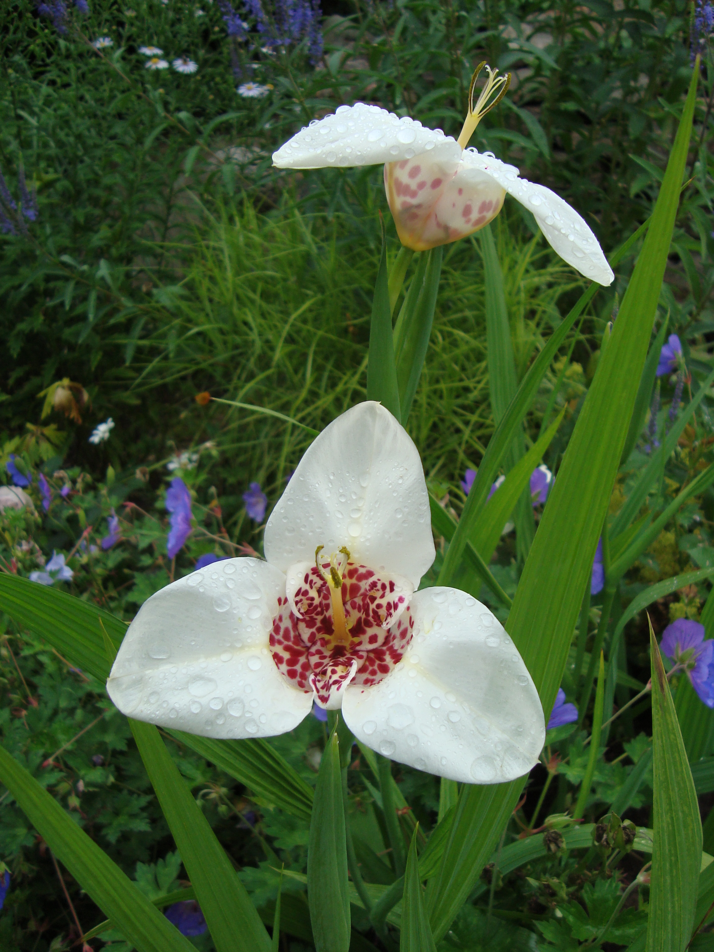 Tigridia pavonia 'Alba Grandiflora'. A cultivar introduced by Hennequin in 1882.